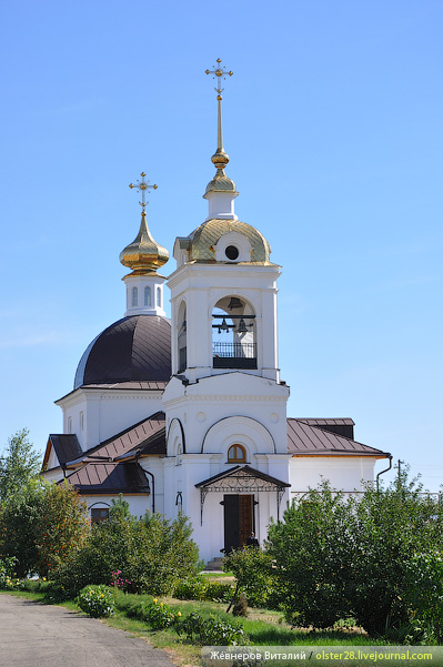 Восстановленный храм в честь святителя Николая Чудотворца, Свято-Никольский монастырь, посёлок Монастырский, Саратовская область